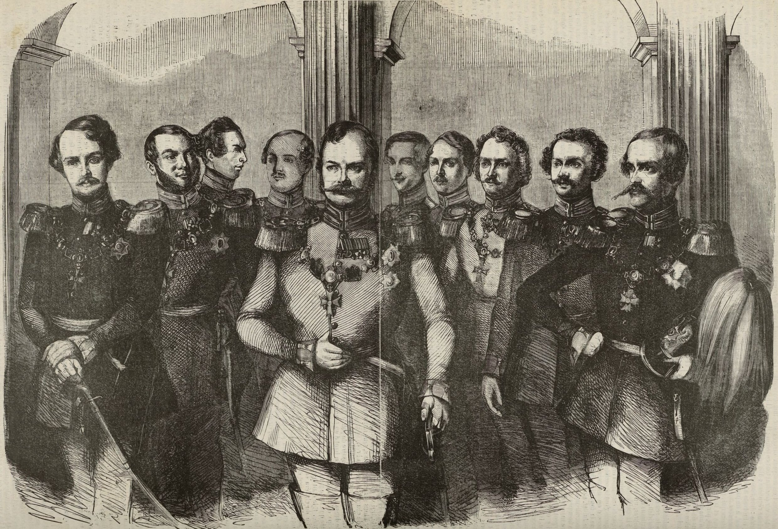 "États-généraux de Prusse. - Membres de la curie des seigneurs appartenant à la famille royale".